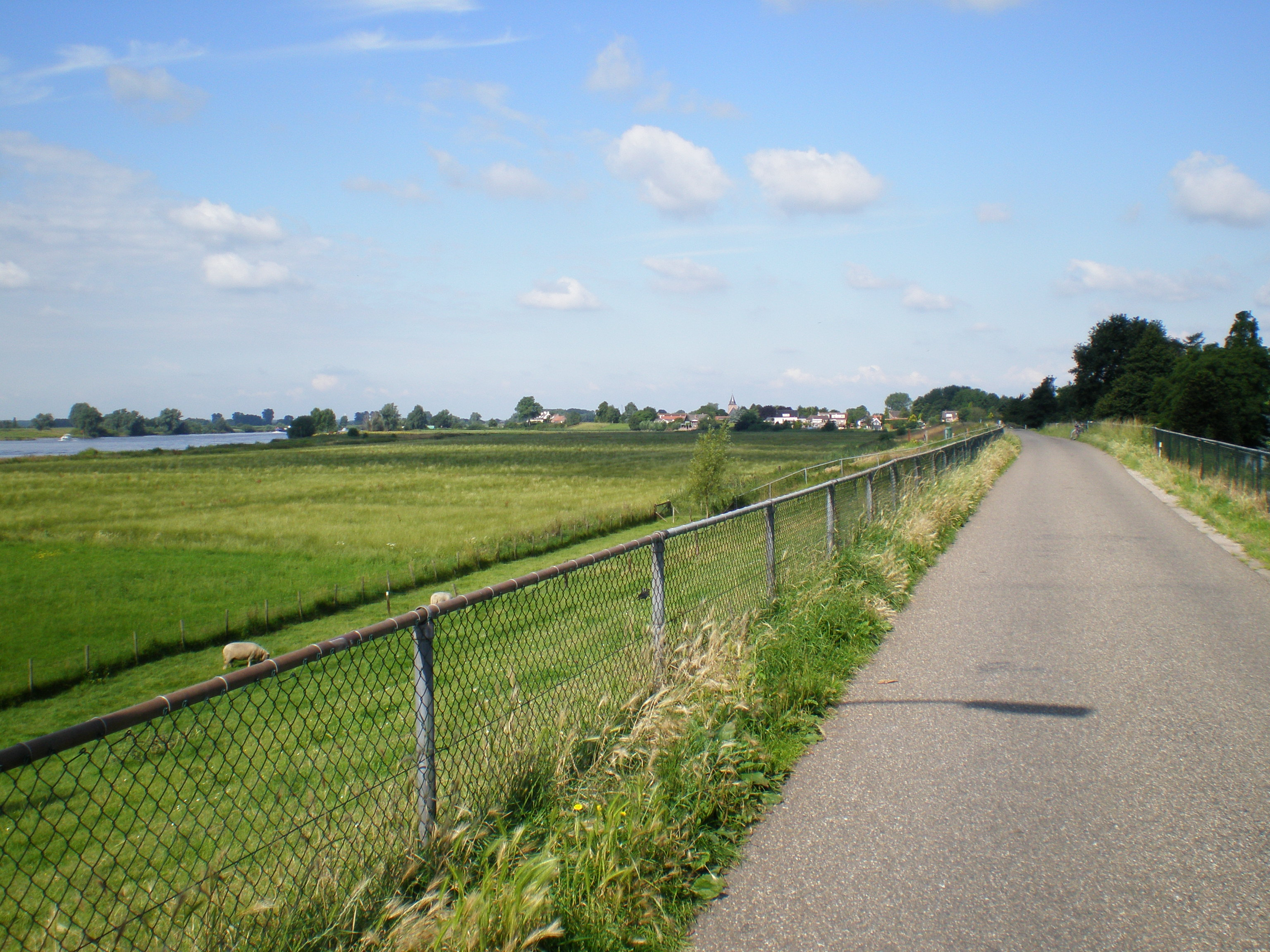 Foto van Well (Gld.) vanaf de dijk bij Ammerzoden. Gemaakt door/op Ninane 08:44, 9 July 2007 (UTC) Toestemming: GFDL